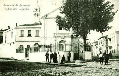 Mater Dolorosa Katolik Kilisesi'nin Osmanlı dönemine ait bir fotoğrafı.